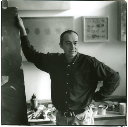 Josef Hirthammer im Atelier 1997